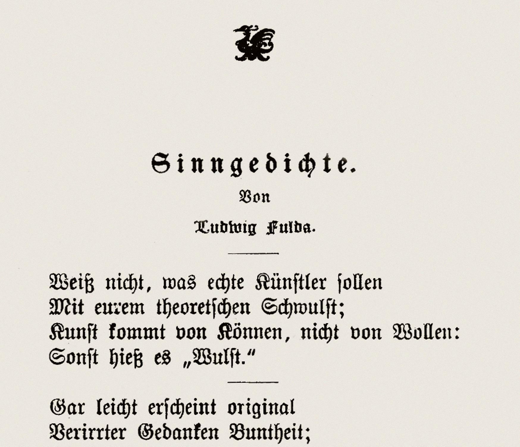 Gedicht von Ludwig Fulda: „Kunst kommt von Können“